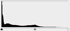 Gradationskurve zum Foto File:12-03-17-aktstudien-nuernberg-by-RalfR-32.jpg